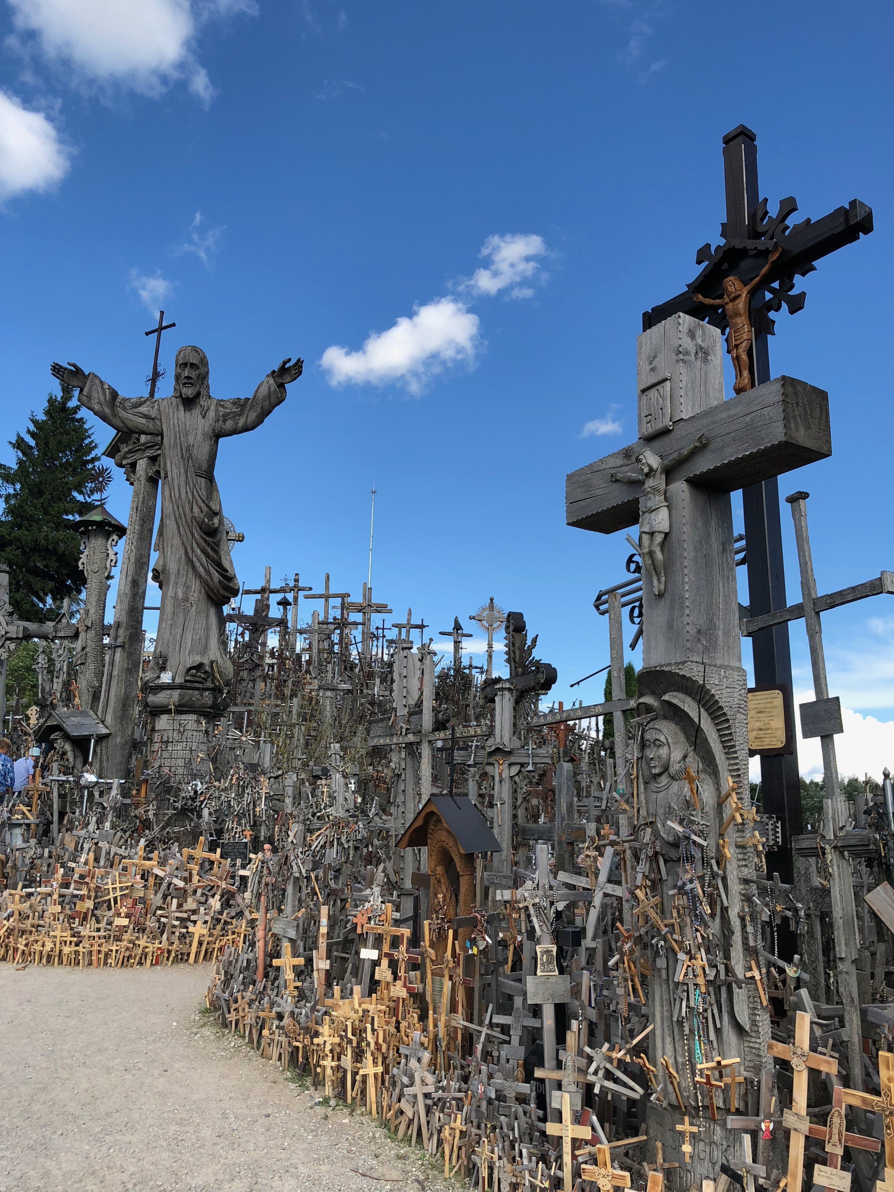 Гора Крестов